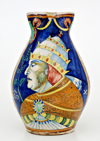 Grande boccale raffigurante Papa Leone X. Cafaggiolo 1515 c.